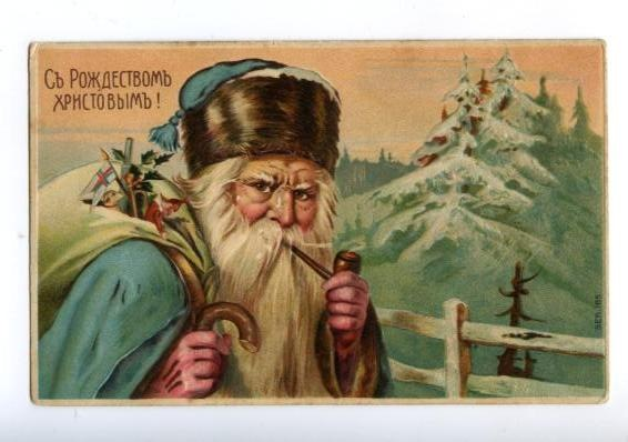 Дед Мороз